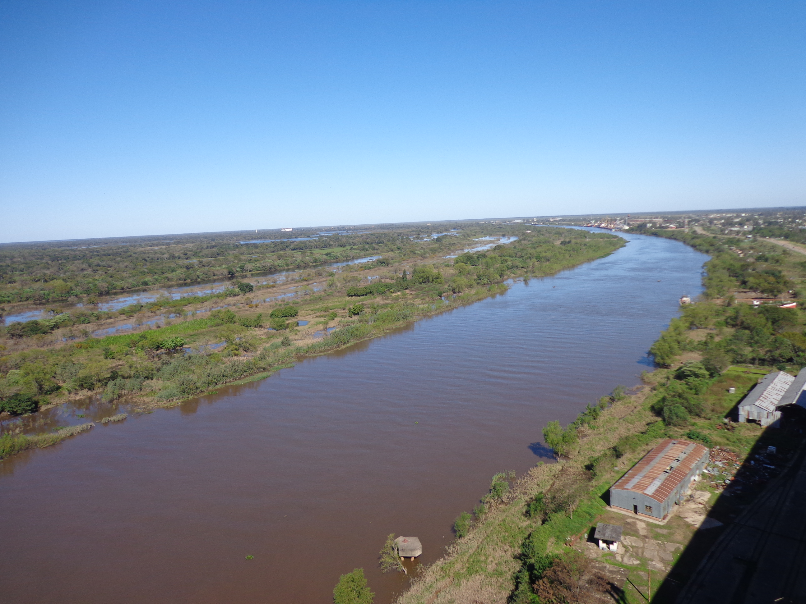 Tramo medio del Riacho Barranqueras visto desde la planta de silos.